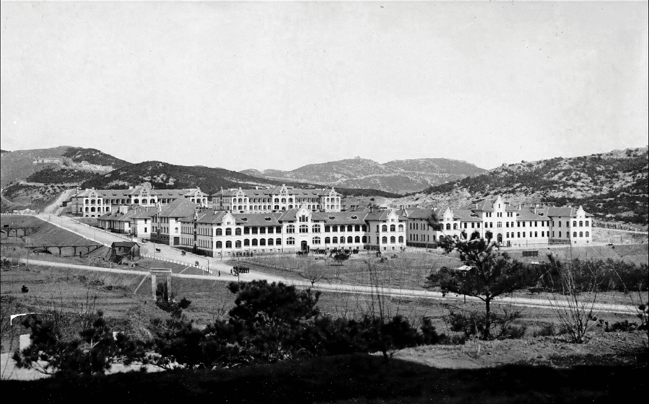 青岛俾斯麦兵营